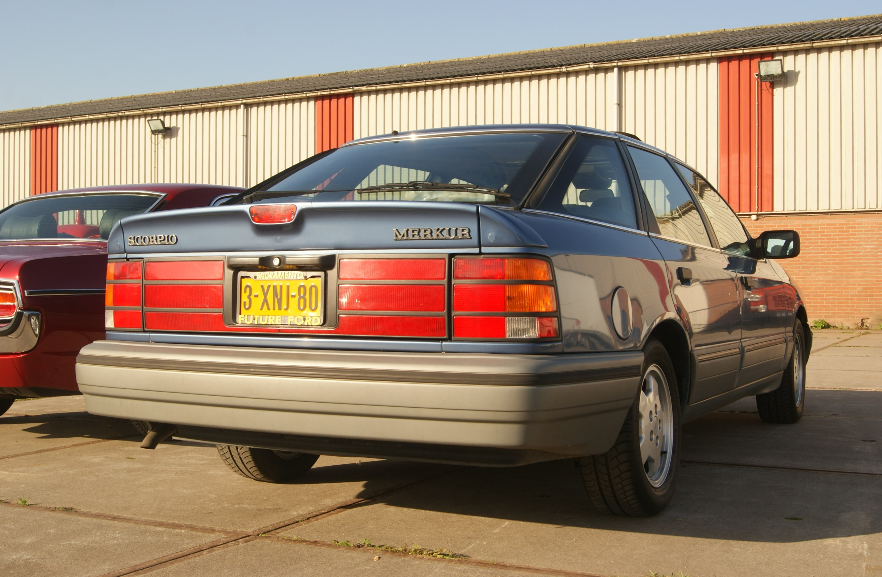 3-XNJ-80 Ford Onderdelendag, Barneveld